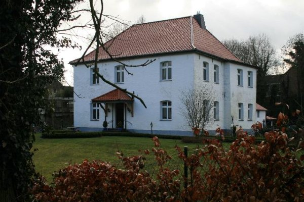 Haus Beeck, Am Lamersberg 1, Denkmal Nr. 25 in Geilenkirchen-Beeck